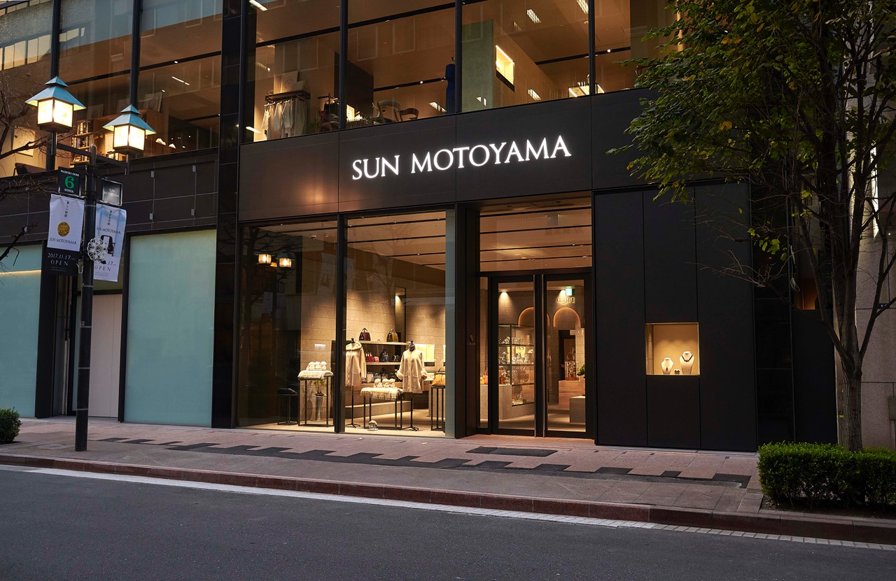 サンモトヤマ 銀座本店